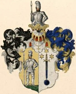 Tunzelmanni suguvõsa aadlivapp